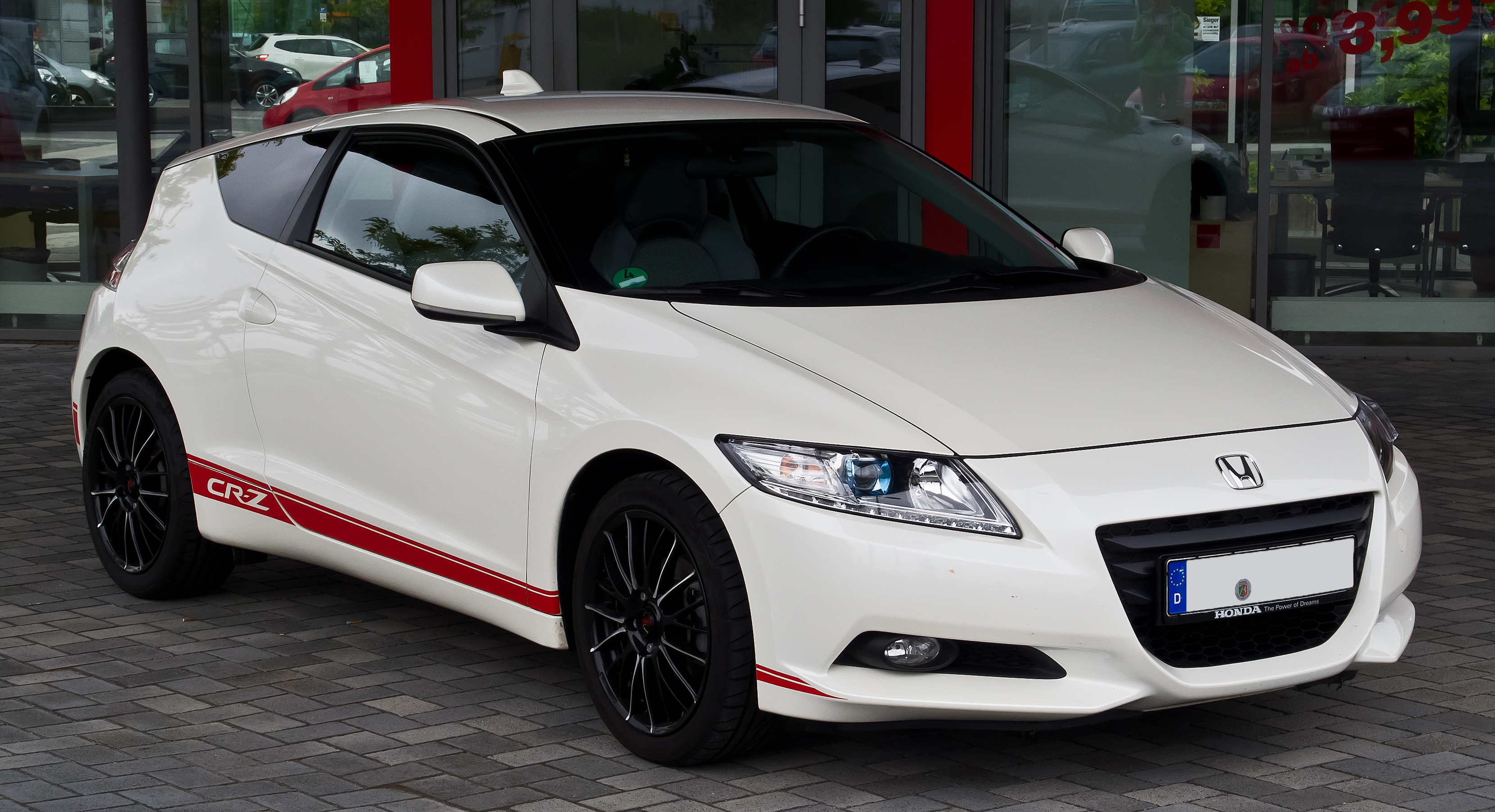 Honda CR-Z 1.5 IMA